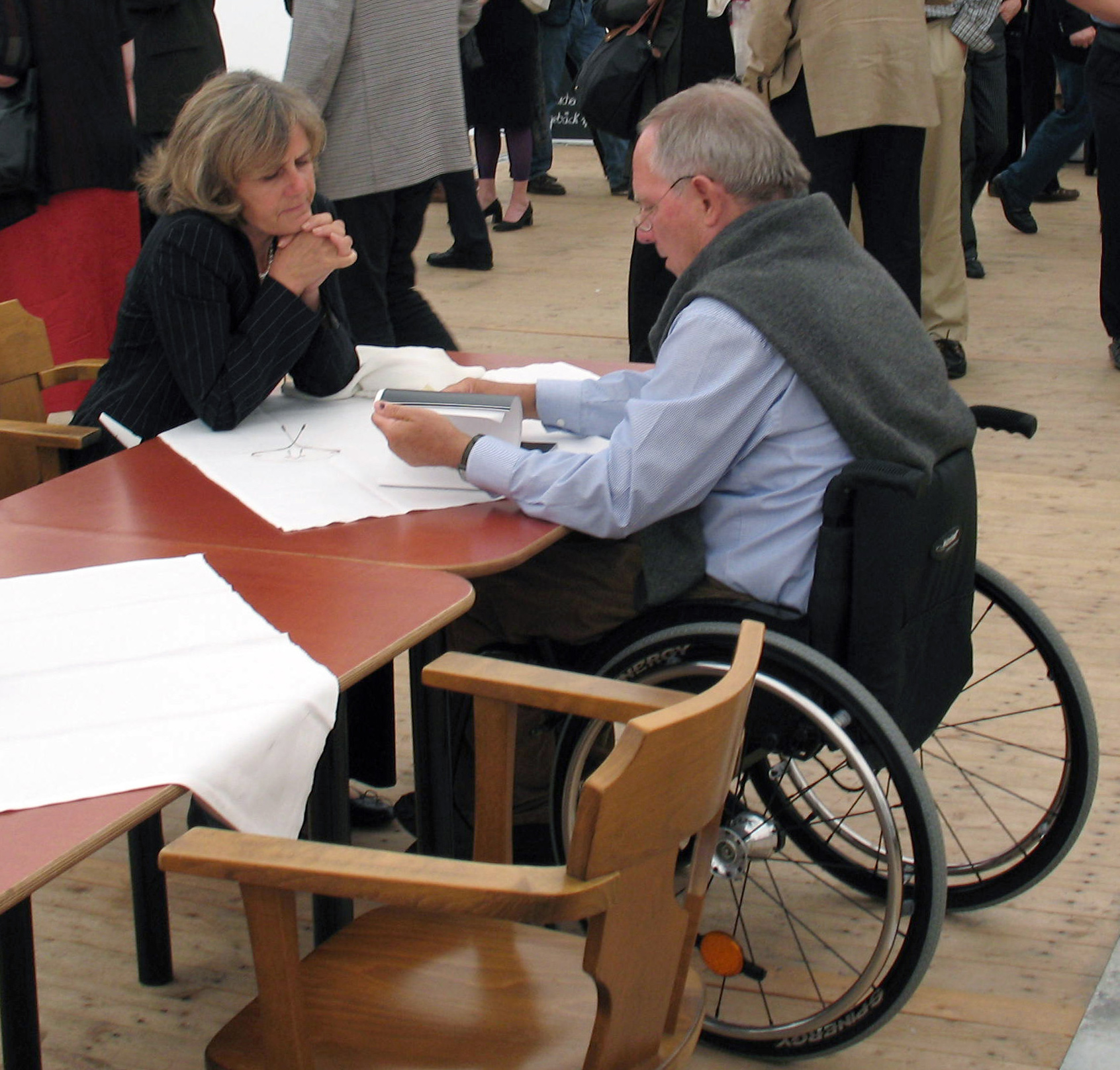 Wolfgang Schäuble (CDU) bei der Vorführung von Peter Steins "Wallenstein"-Inszenierung in Berlin-Neukölln. Pfingstmontag 2007. Schäuble sitzt mit seiner Frau an einem extra für ihn gebrachten Tisch (GND 118814311)